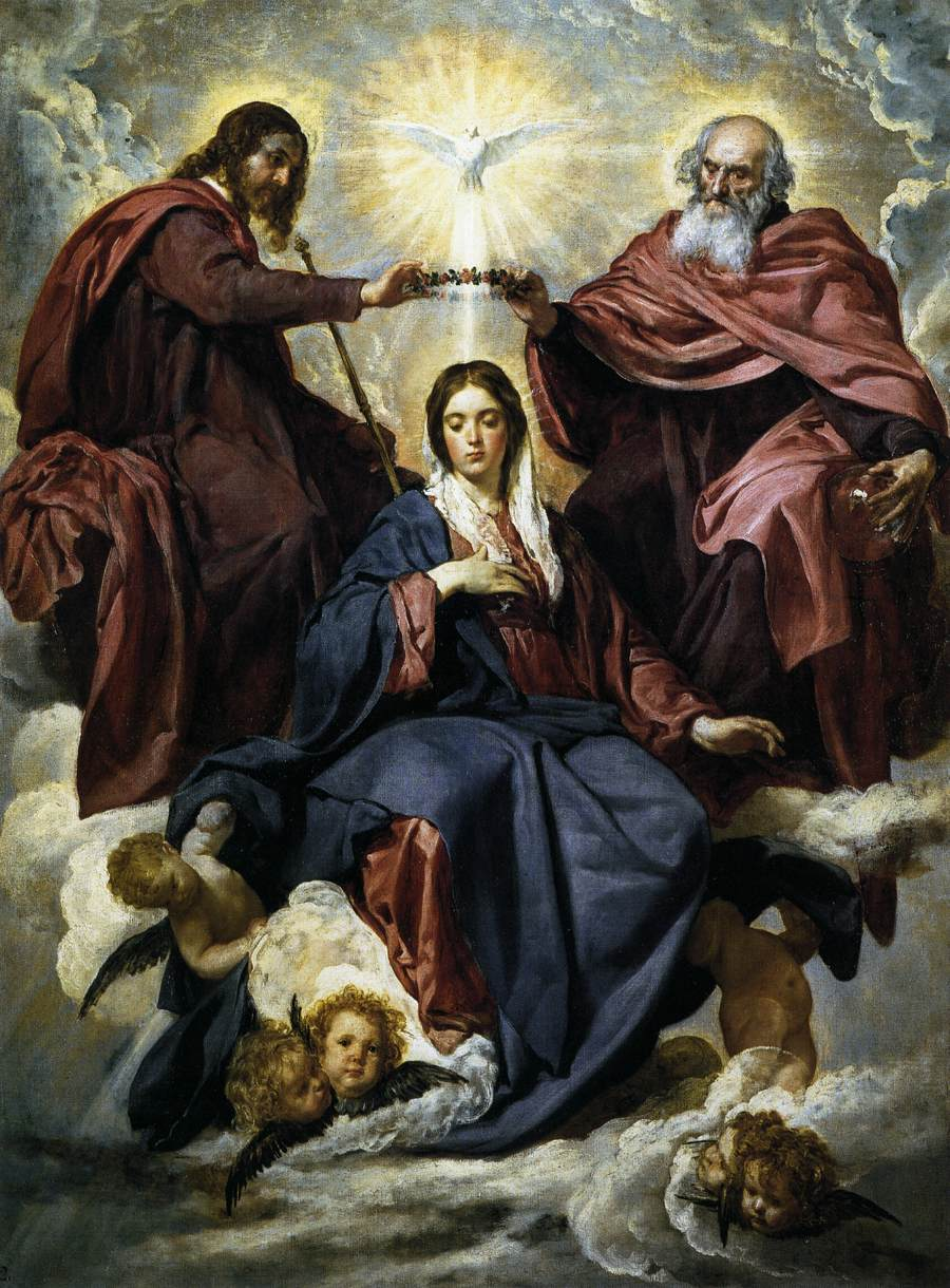 La obra representa la coronación de la Virgen María, madre de Jesucristo, por los tres miembros de la Santísima Trinidad.